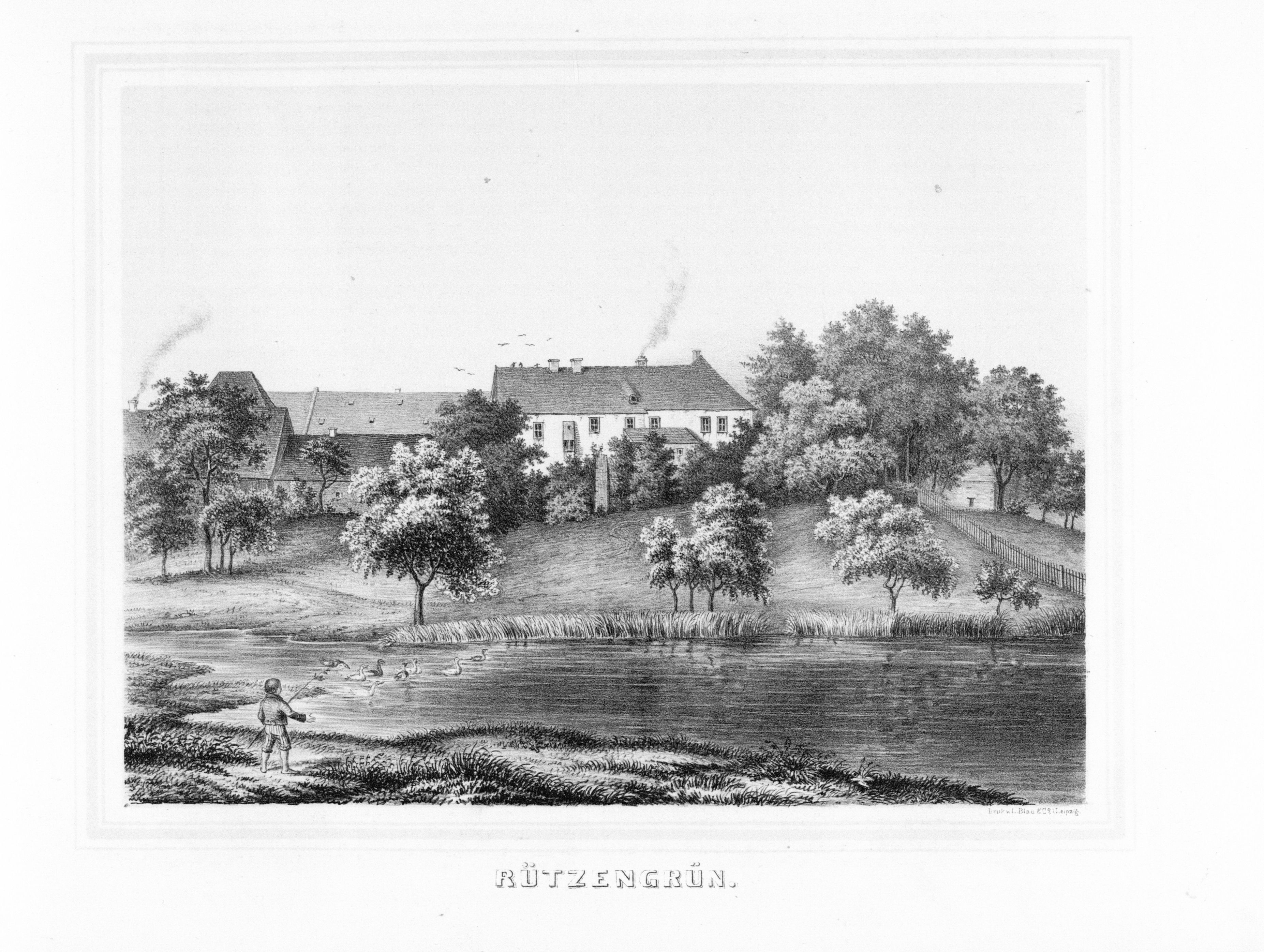 Rützengrün aus: Album der Rittergüter und Schlösser im Königreiche Sachsen Voigtländischer Kreis Section: V